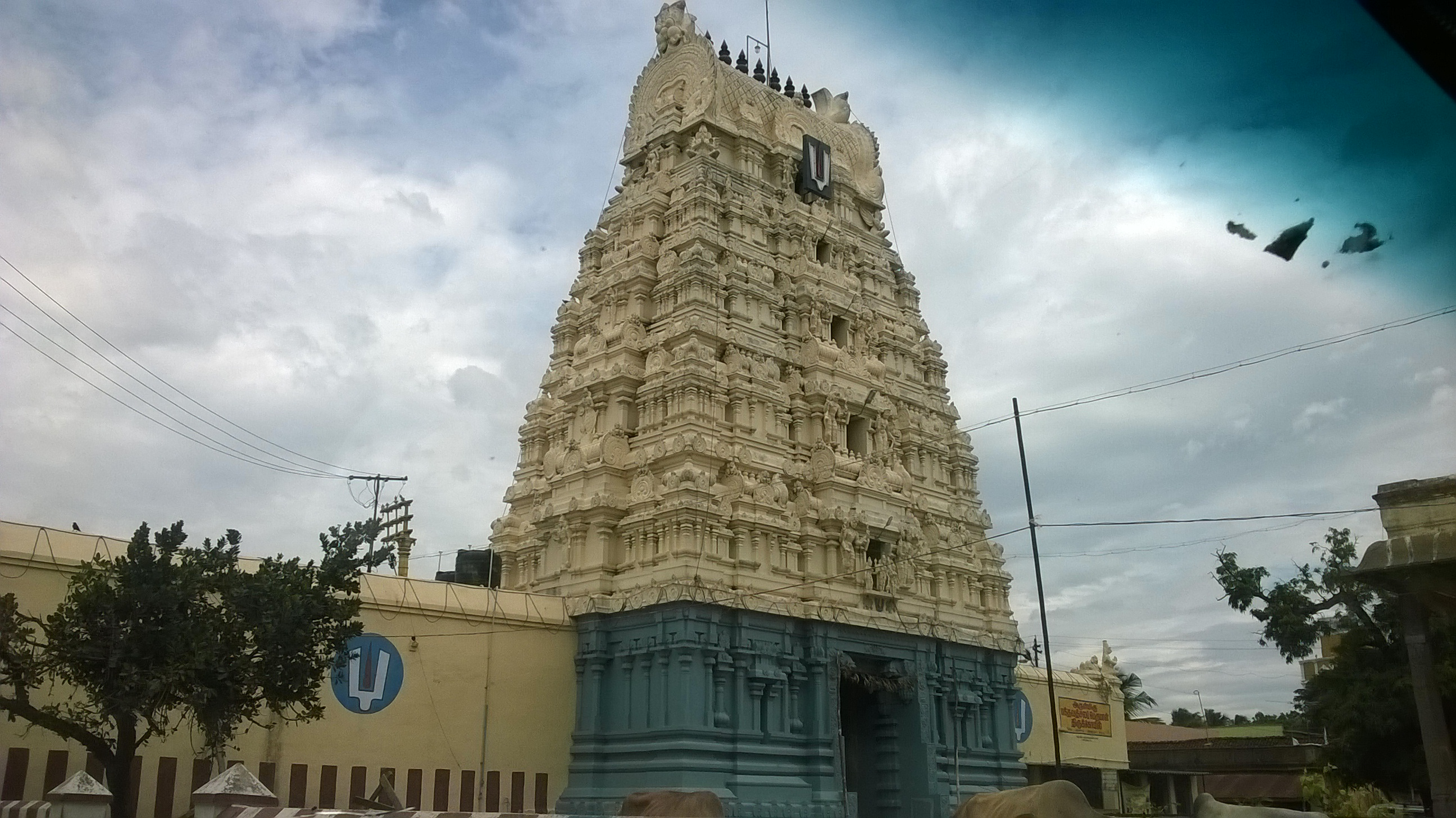 திருநின்றவூர் பெருமாள் கோவில்